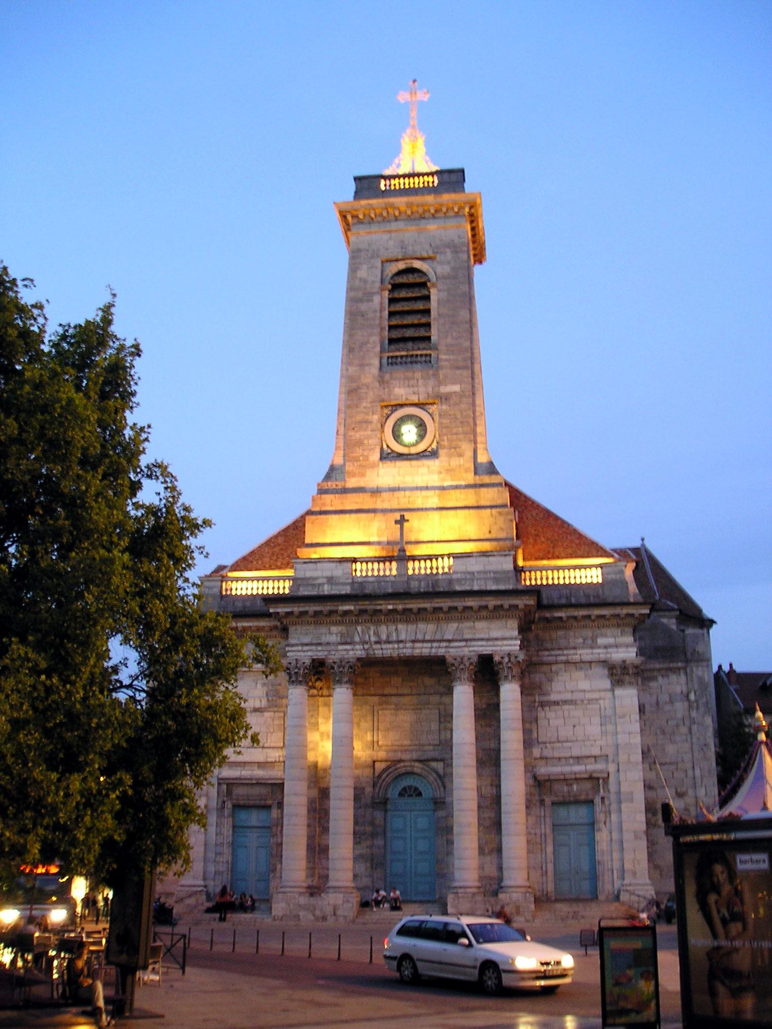 Église Saint-Pierre de Besançon, à la tombée de la nuit/ St-Peter church of Besançon, at sunset.